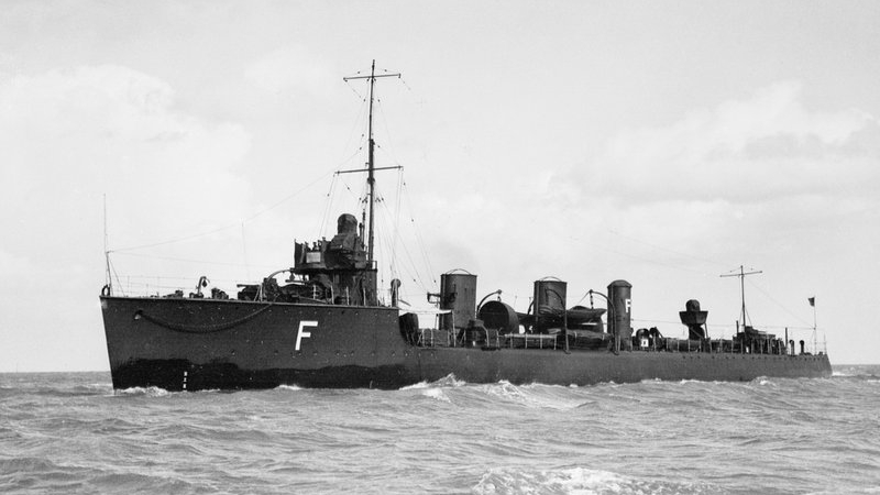 Der Zerstörer HMS Afridi der ersten britischen Tribal-Klasse